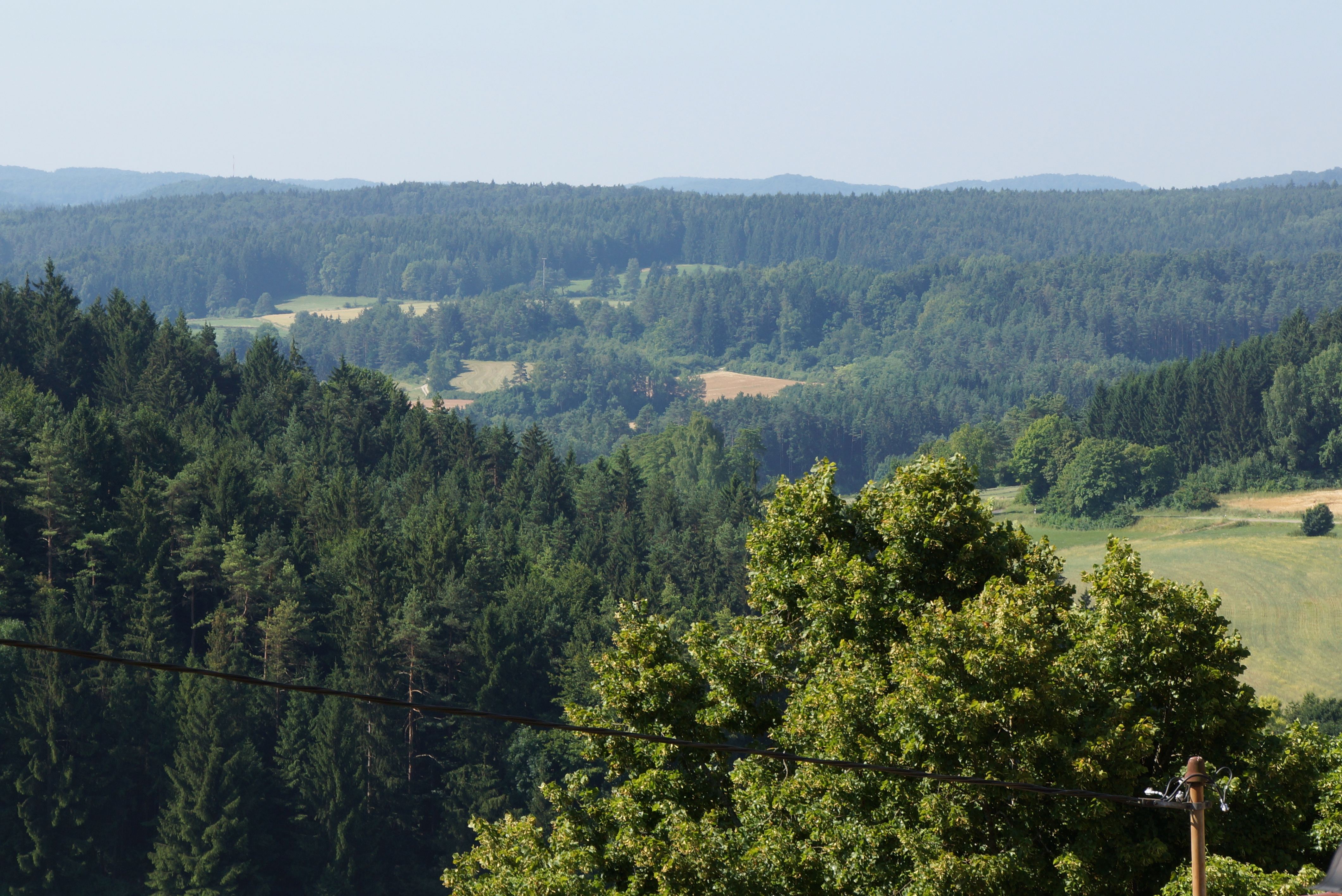 Blick von der Wallfahrtskirche